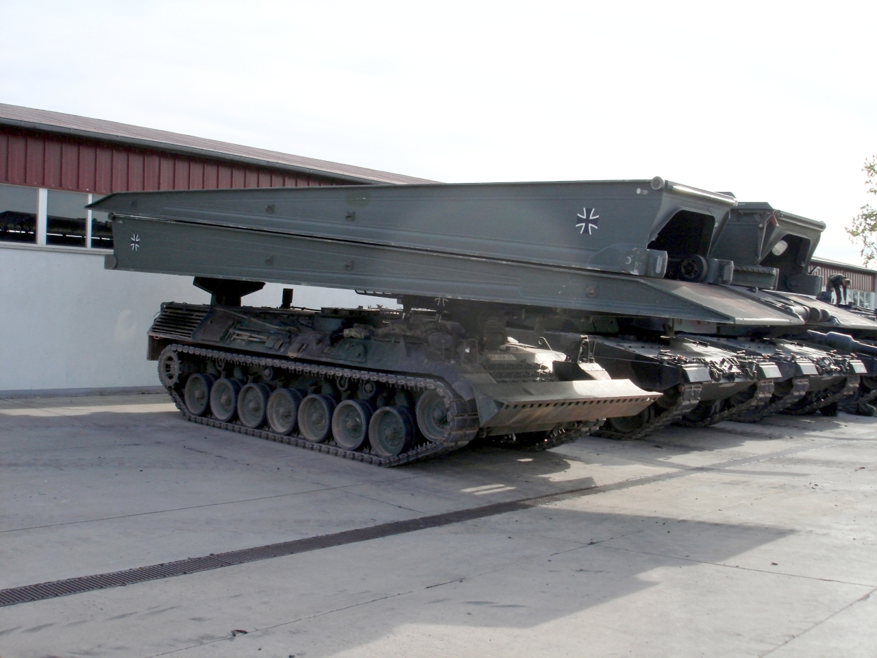 Panzerschnellbrücke Biber auf Leopard 1 Brückenleger